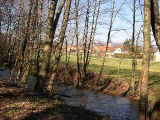 Paysage de Lachapelle-sous-Chaux (Territoire de Belfort, France) Photo prise par LP90 le 30 mars 2004 License GFDL LP90